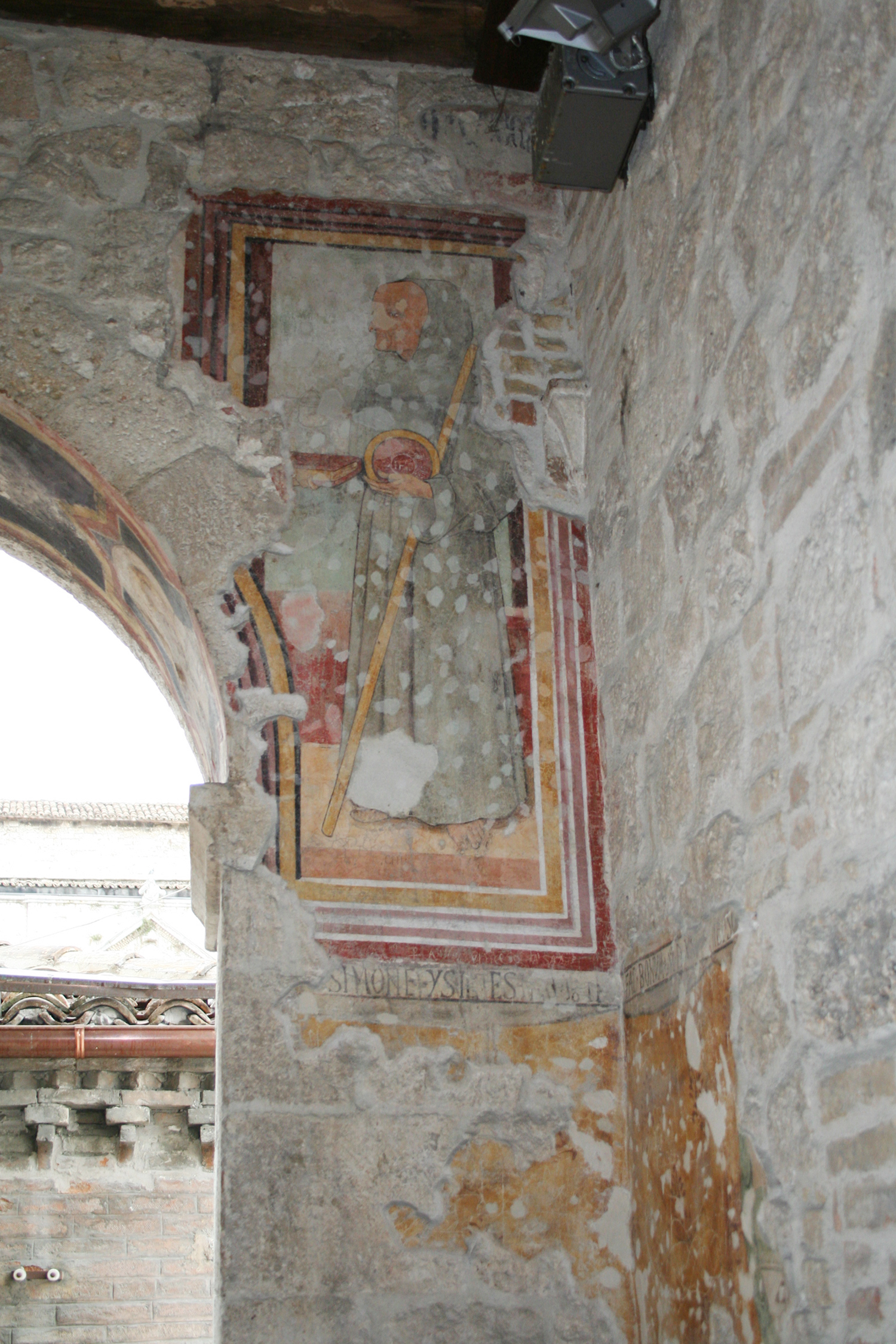 Palazzo dei Capitani del Popolo di Ascoli Piceno, tracce di affreschi presenti sulle pareti delle loggette della facciata.